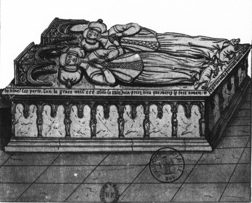 Jeanne et Blanche